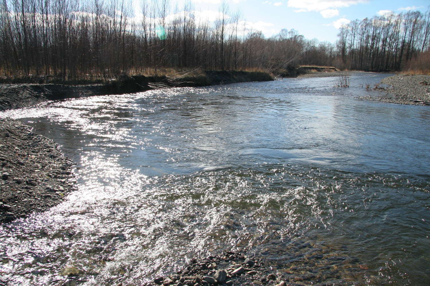 Сахалинская река Тымь.